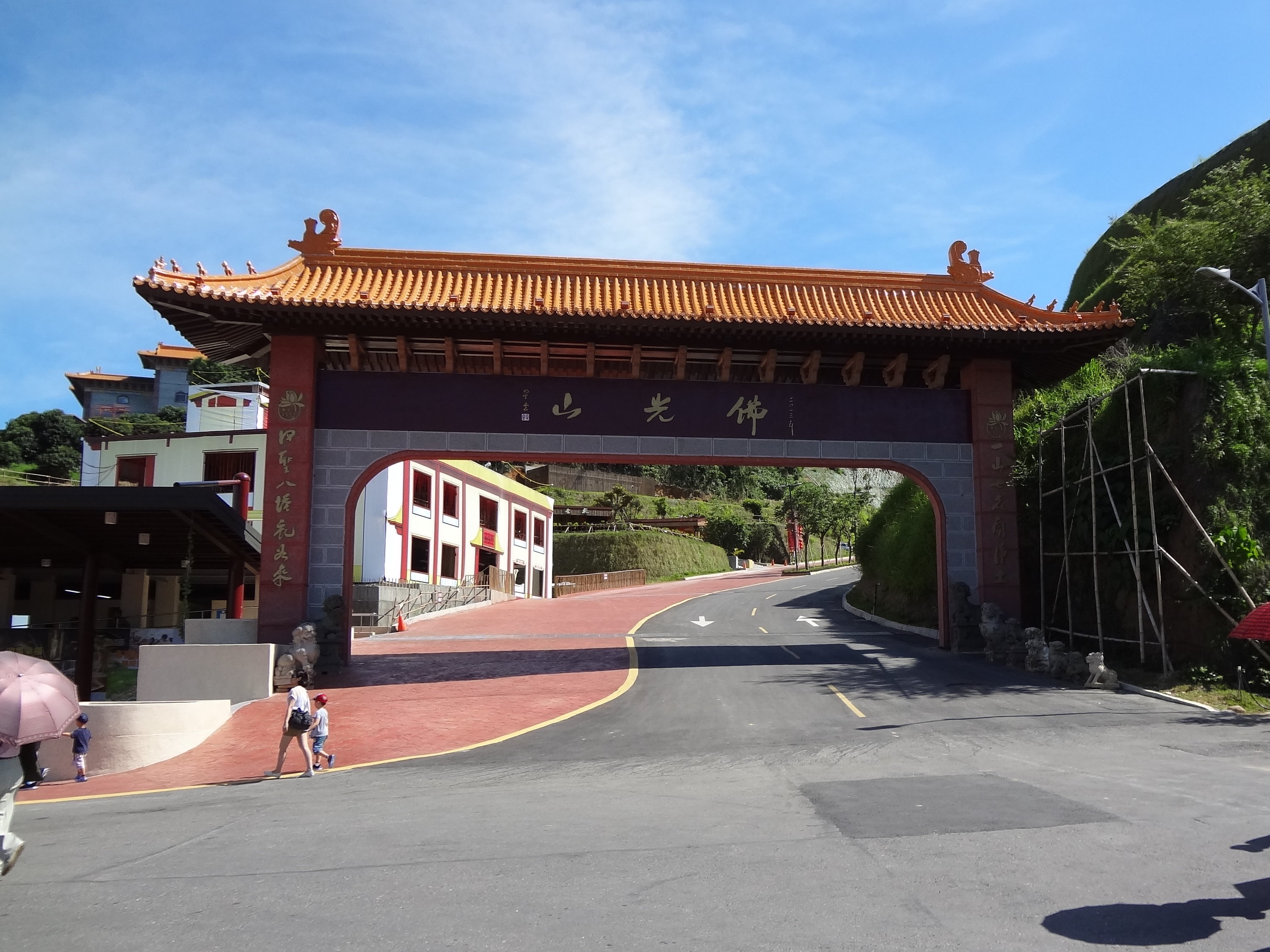 由佛光山佛陀紀念館進入佛光山的入口，即佛光山後山門。